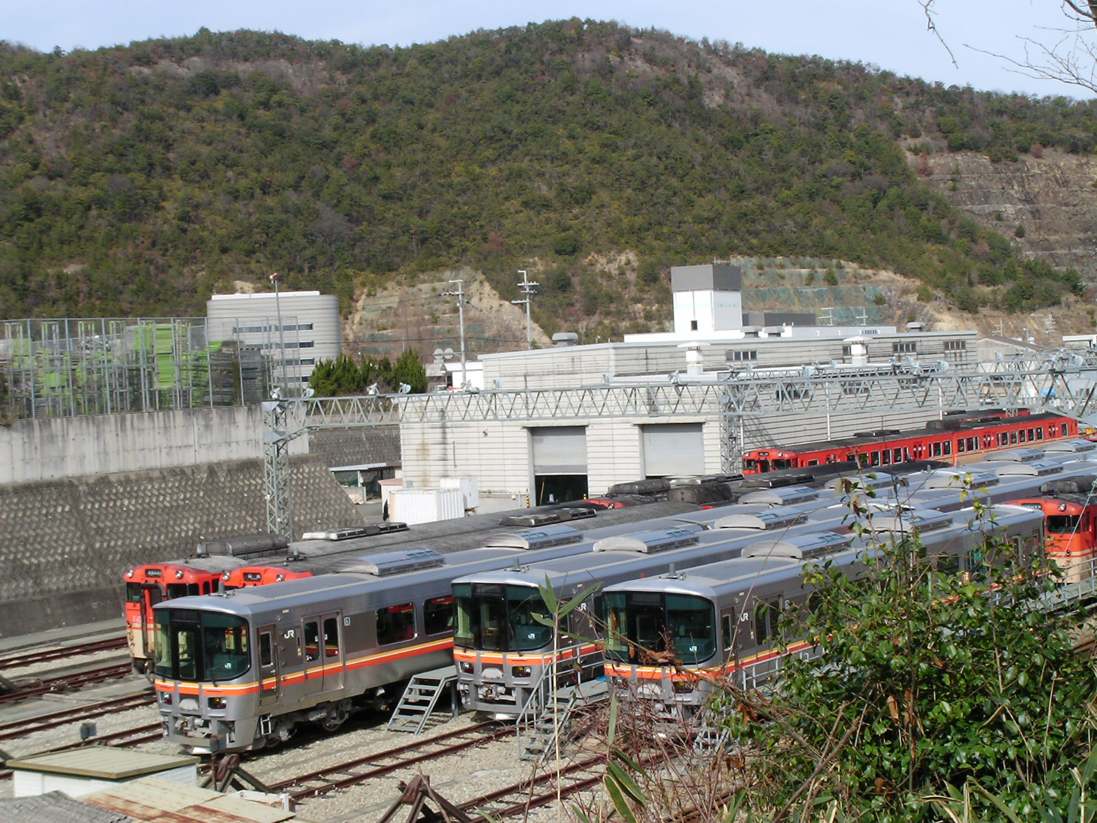 姫路鉄道部にて。 キハ127形気動車 キハ122形気動車 キハ40形気動車